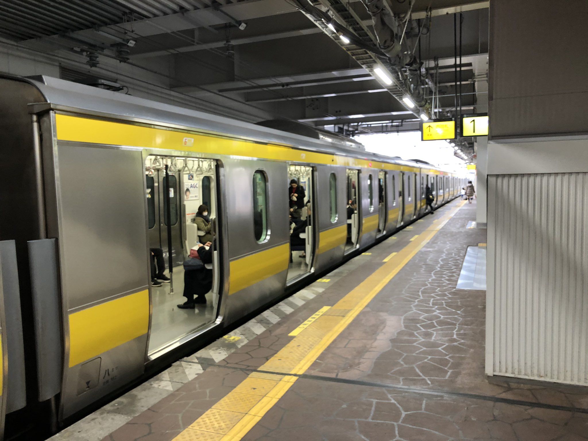 E231系0番台の5号車にある6ドア車